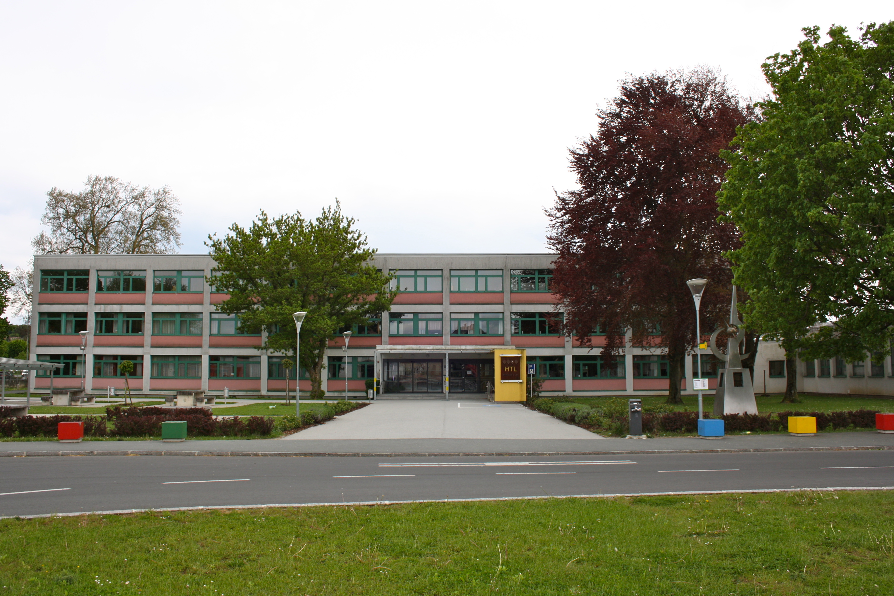 HTL Pinkafeld.